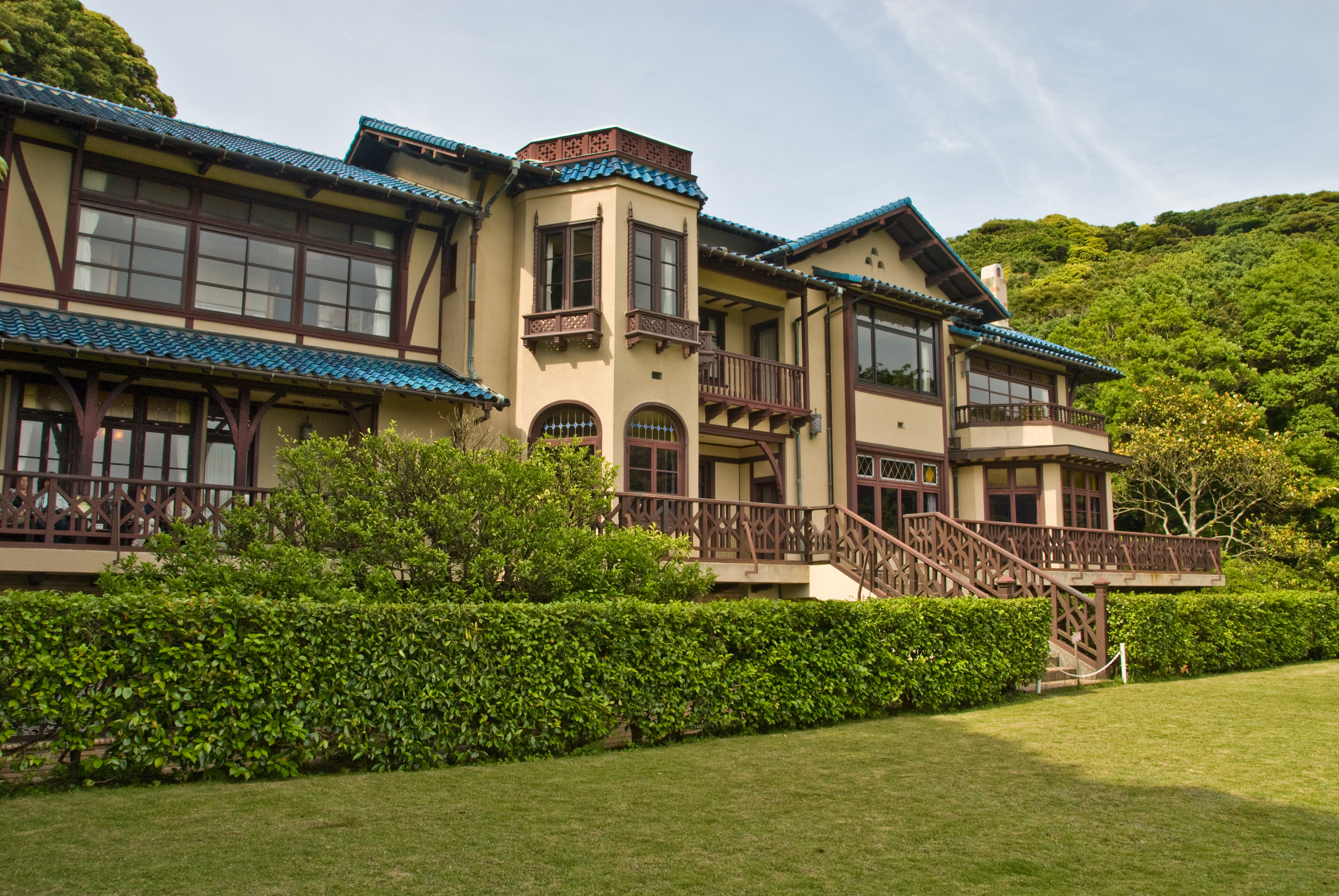 The Literature Museum in Kamakura